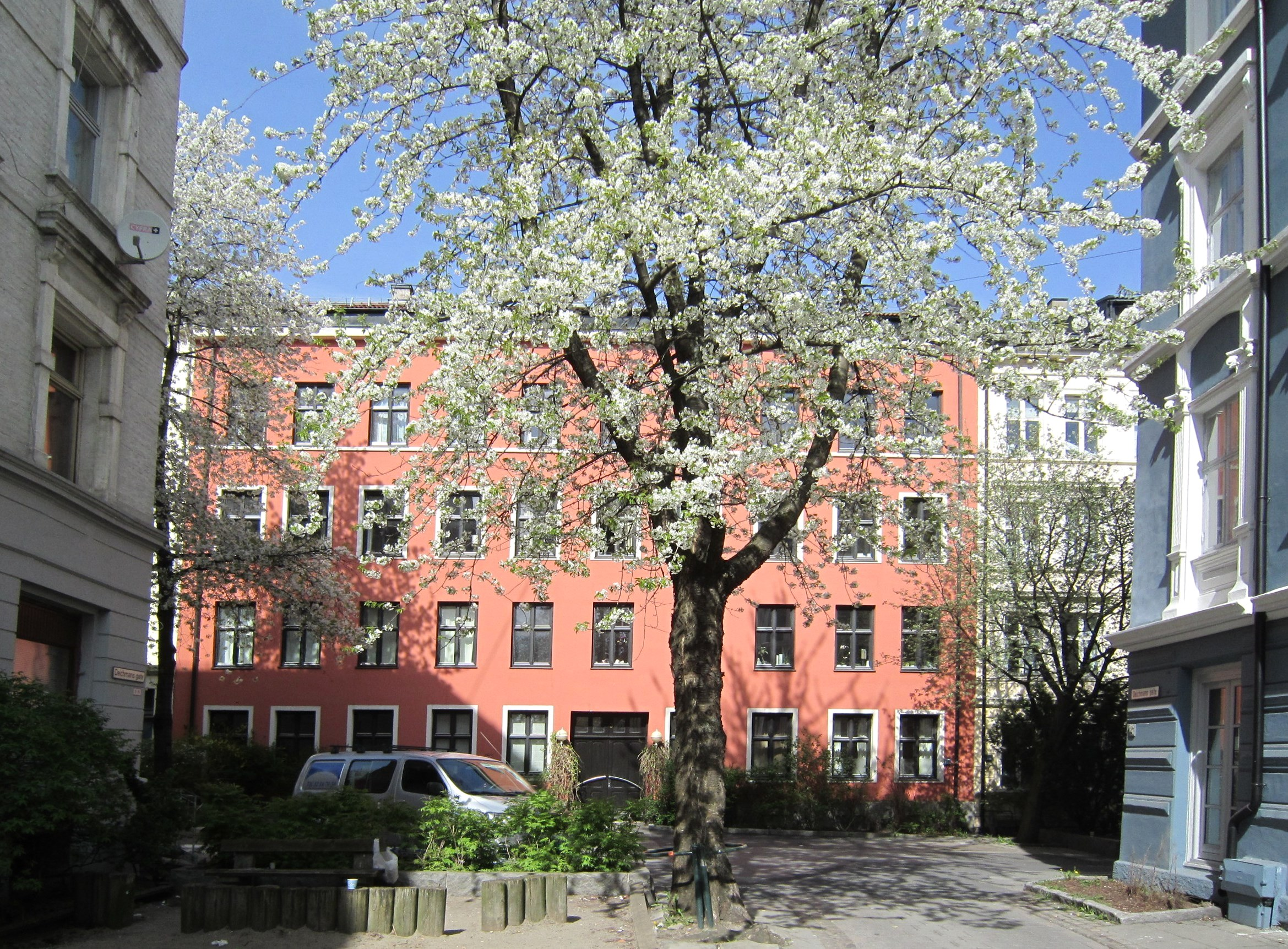 Iduns gate i Oslo